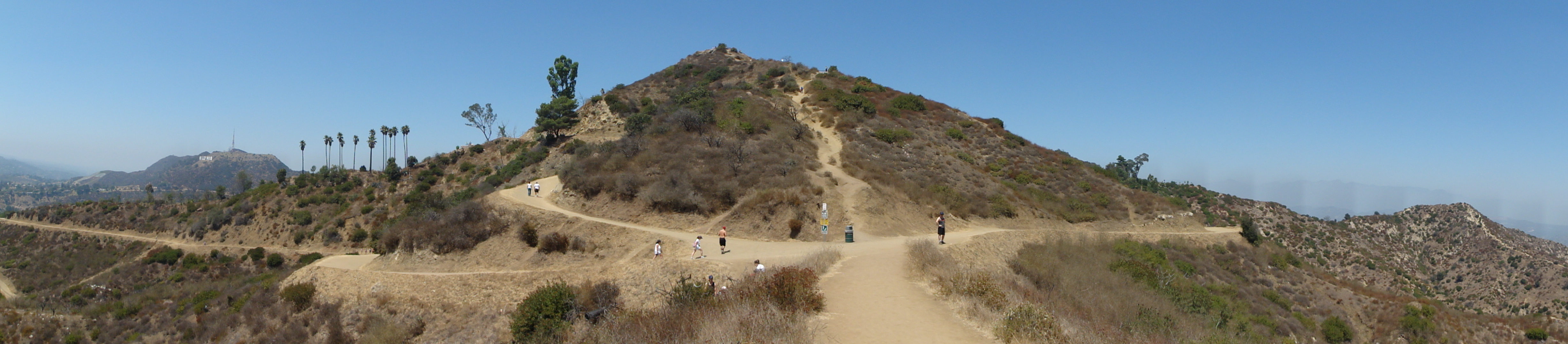 Panoramatický pohled na Mount Hollywood. Vlevo v pozadí je vidět Mount Lee, na němž se nachází Hollywood Sign.